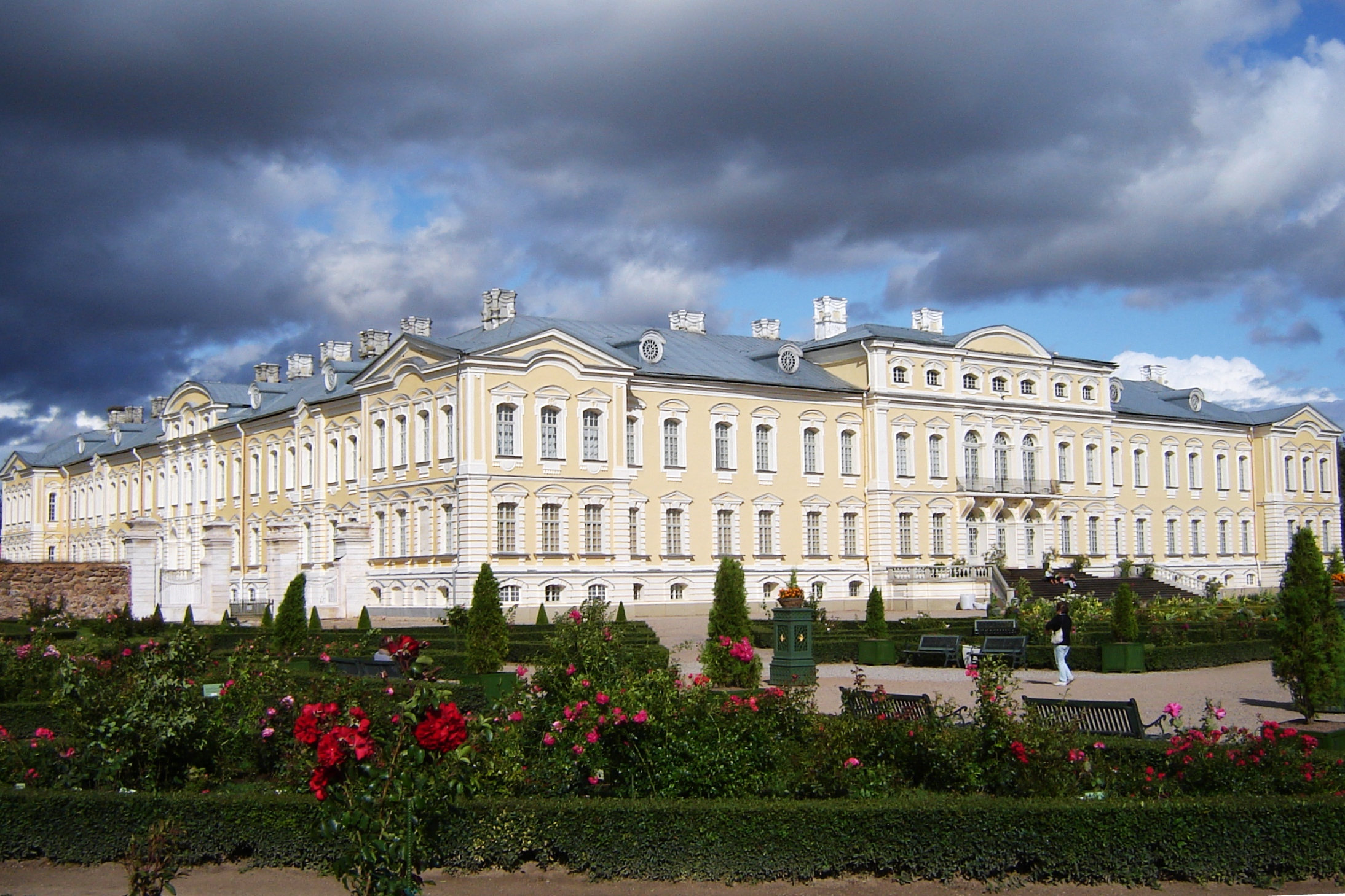 Schloss Rundāles, Südwestansicht